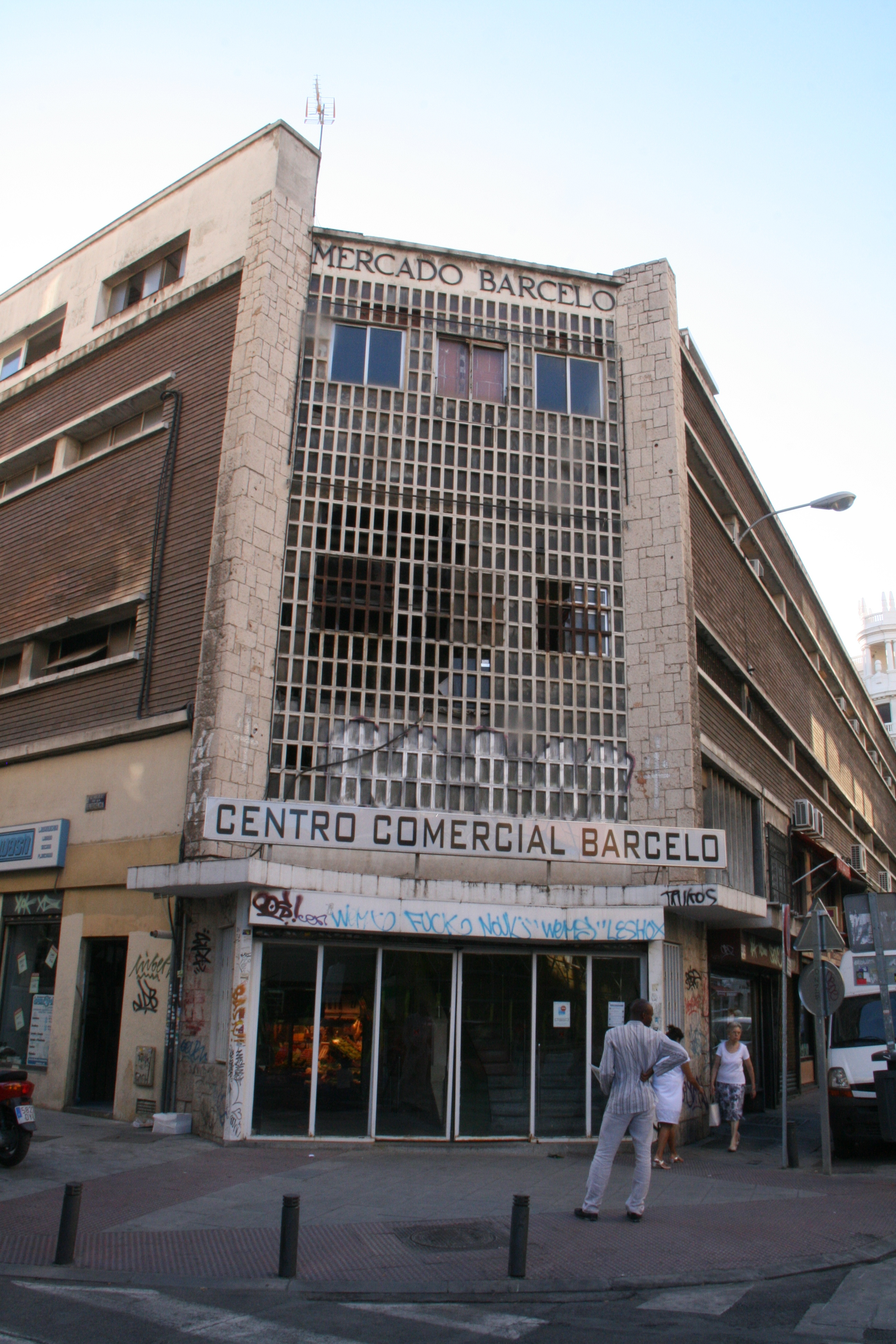 Viejo "Mercado Barceló" (Antonio Barceló), Calle de Barceló - Entrada - Madrid. El nuevo "Mercado de Barceló" de los arquitectos Enrique Sobejano y Fuensanta Nieto estará terminado a finales de 2010 ó principios de 2011.